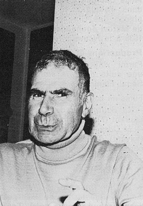 L'acteur français Jacques Dufilho en 1978.